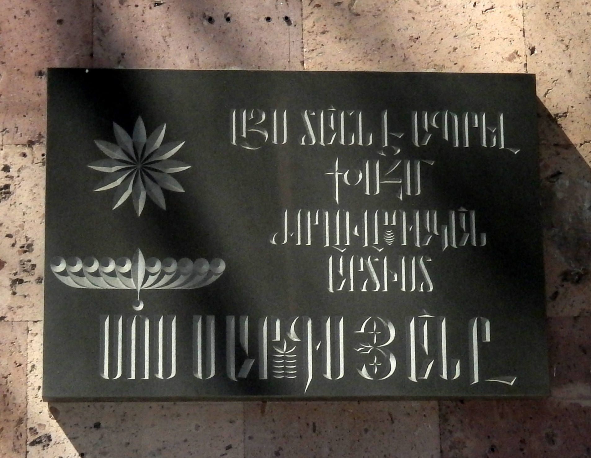 Plaque for Sos Sargsyan on Yeryan street, Yerevan